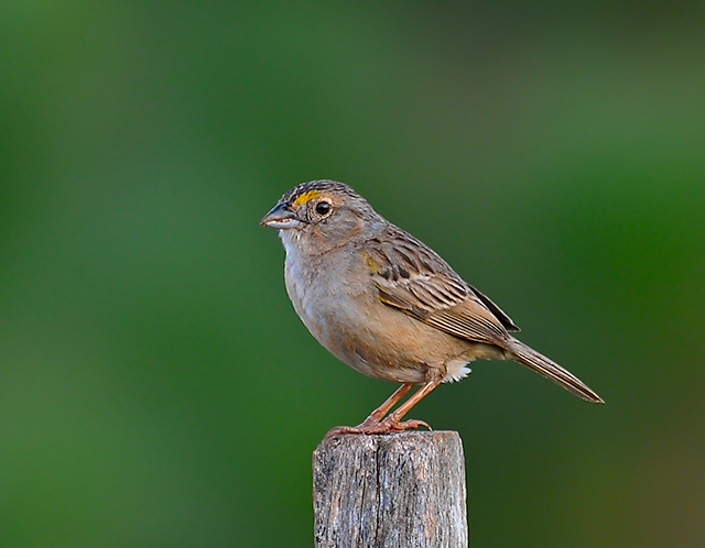 Piraju-SP - Brasil